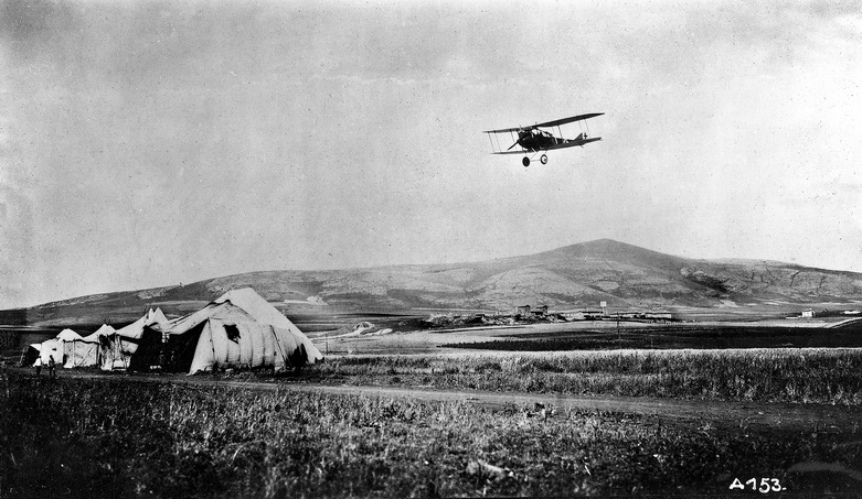 צילום אוויר מגובה נמוך של מנחת הטייסת הבאוורית 304 והאוהלים מעבר חצר מרחביה ומימין בית זברסקי על רקע גבעת המורה. ; 1917 - / קואופרציה